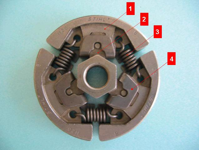 Центробежен съединител (промяна в позициите)